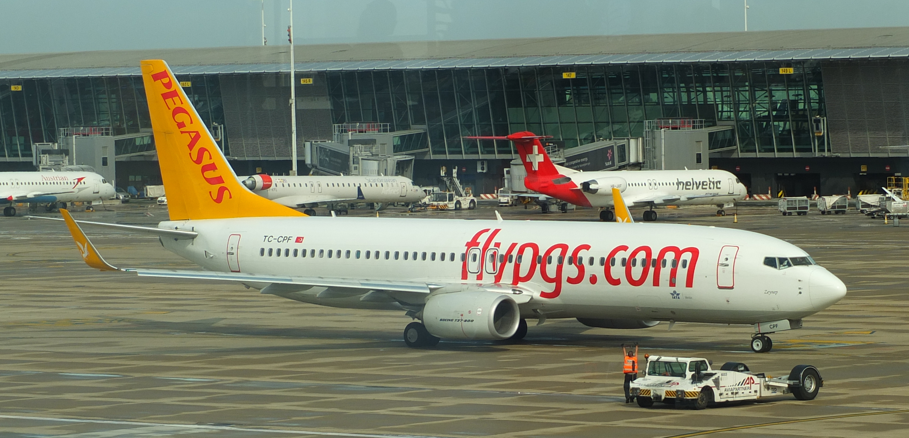 Pegasus Airlines 737-82R (Next Generation) TC-CPF (cn 40879/4267) op Zaventem Brussels Airport.